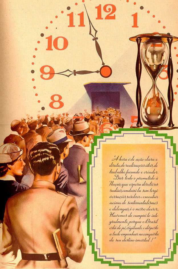 כרזת תעמולה של "המדינה החדשה".